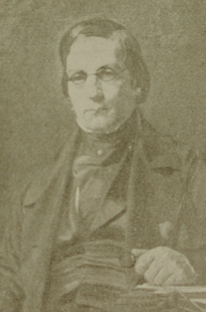 Claudio Gay (Draguignan, Francia - 18 de marzo de 1800 - Le Deffrens, Francia - 29 de noviembre de 1873) fue un botánico y naturalista francés que realizó los primeros estudios amplios de la flora, fauna, geología y geografía chilenas.